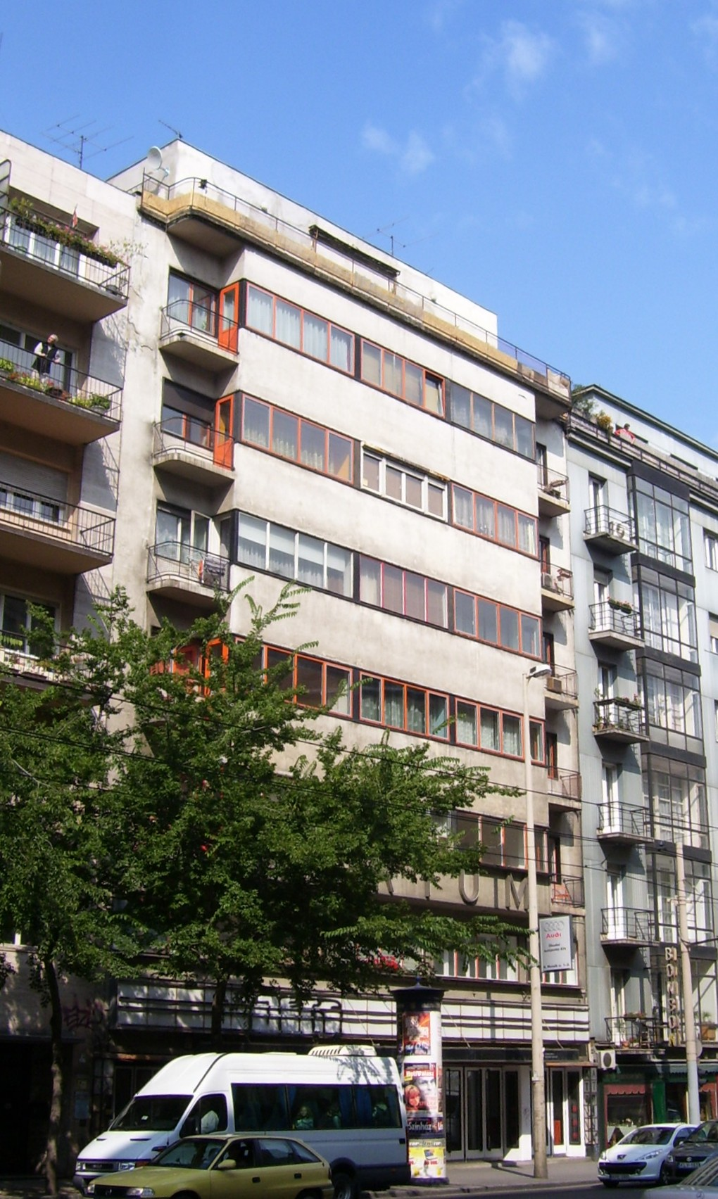 Bp. II. Margit krt. 55 ÁTRIUMHÁZ. Tervező: Kozma Lajos (1935–36)